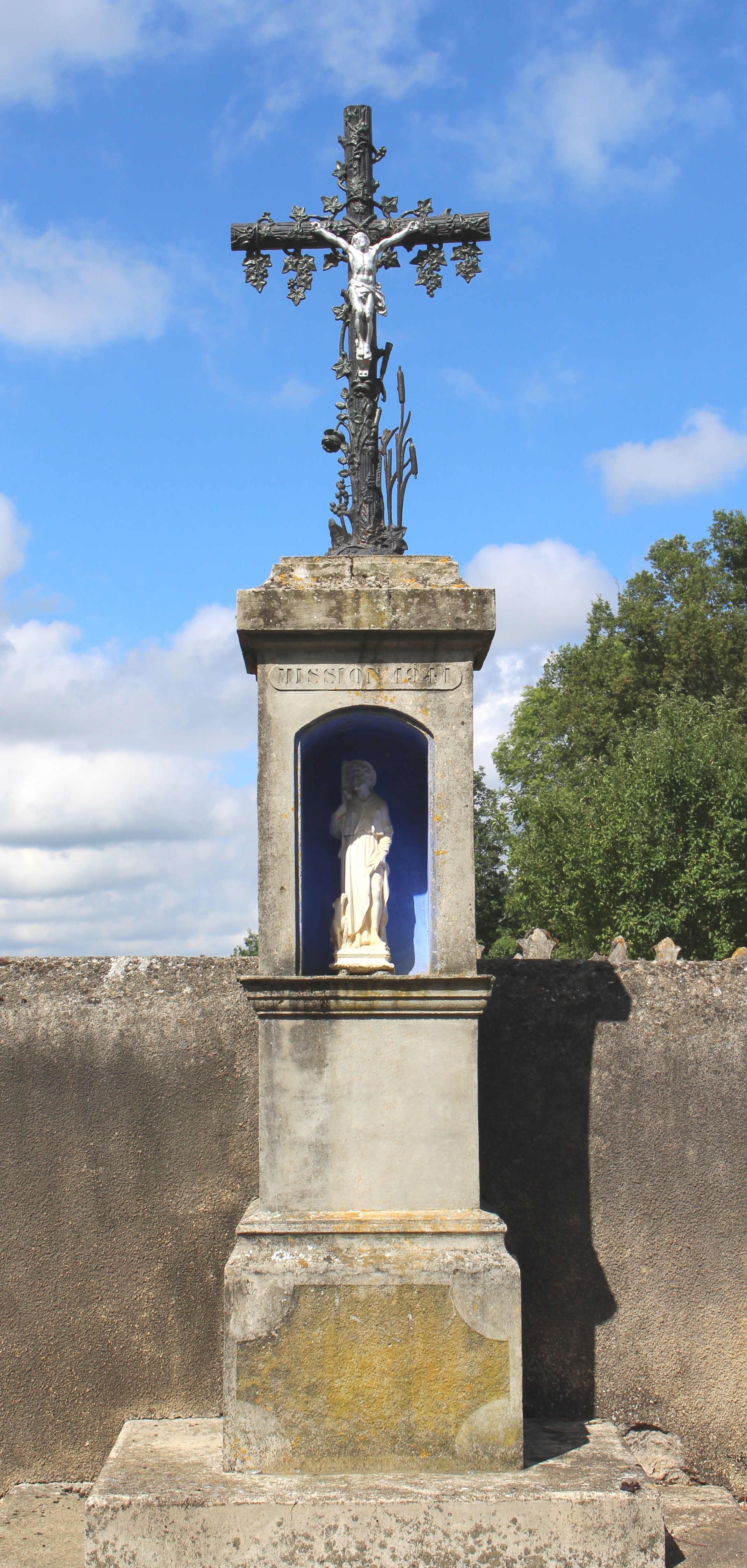 Oratoire de Luby-Betmont (Hautes-Pyrénées)